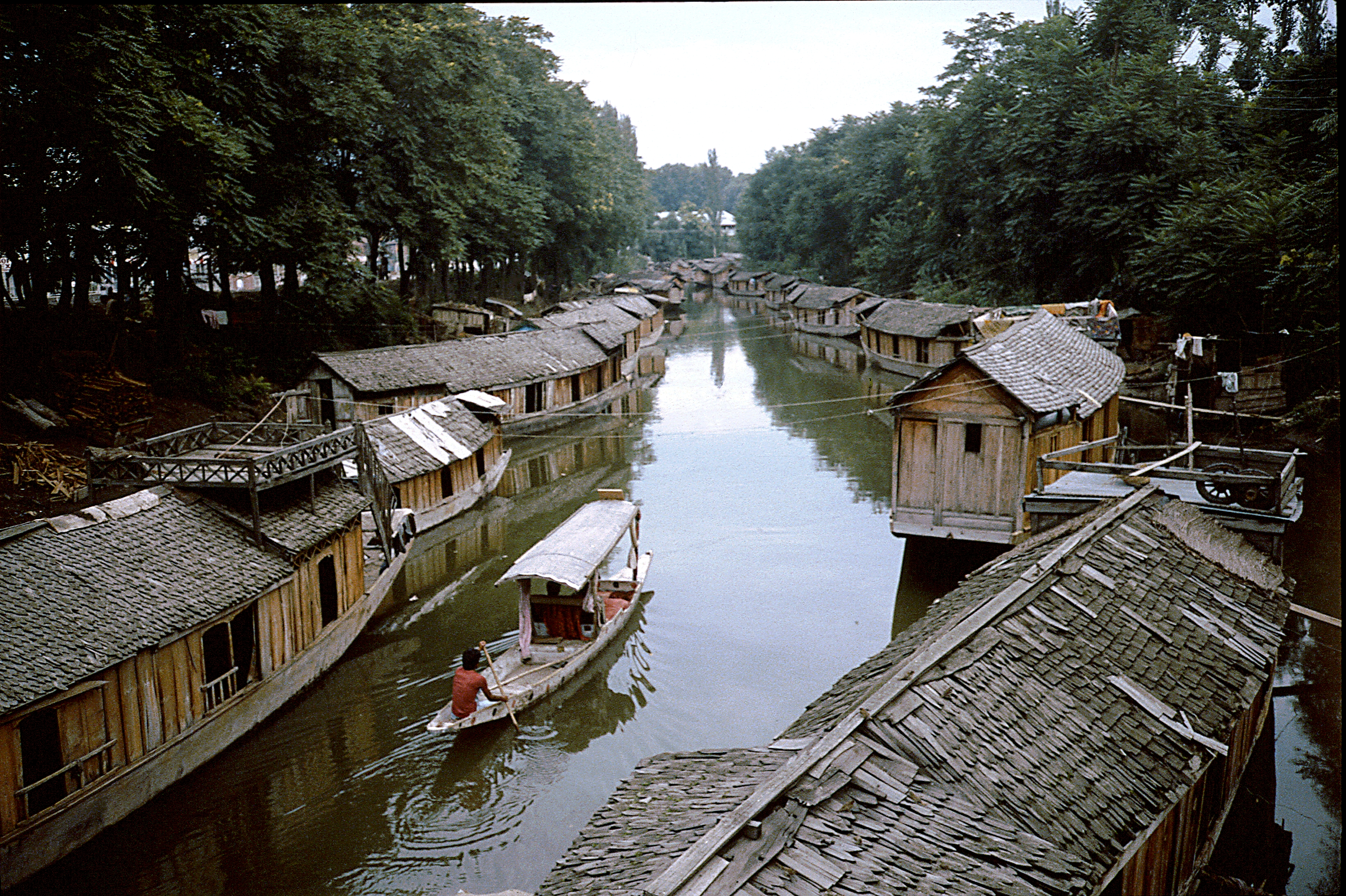 Houseboats populaires à Srinagar en 1986.